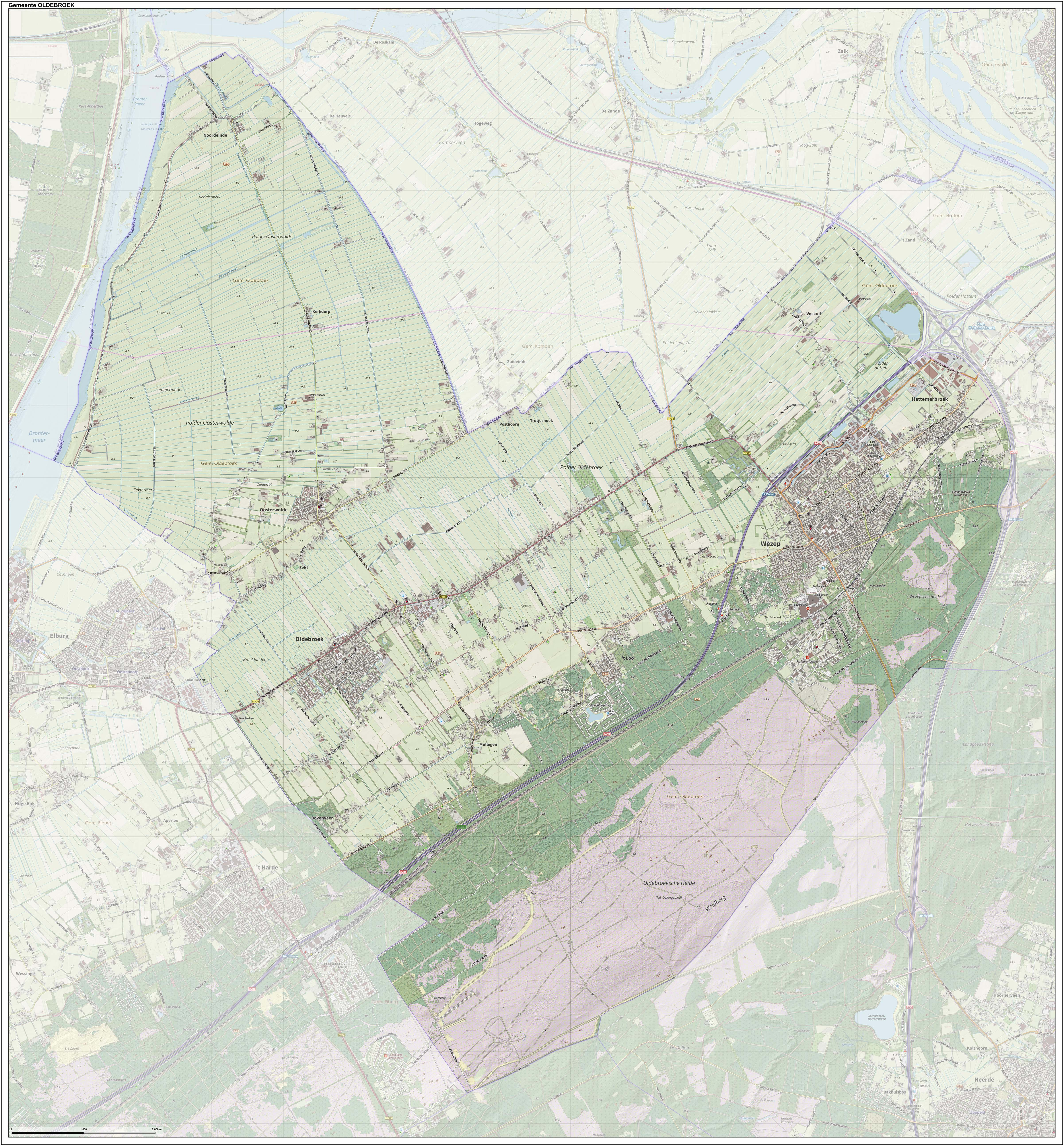 Topografische gemeentekaart. Resolutie: 400 pixels/km. Kaartbeeld samengesteld uit de open geodata van de Top10NL en Top25namen (Kadaster), Creative Commons-BY licentie. Gebouwvlakken uit open geodata BAG extract. Wegen uit de OpenStreetMap, OpenStreetMap community. Reliëfschaduw uit de Actuele Hoogtekaart AHN2. Samenstelling en kleurenschema: Jan-Willem van Aalst, met QGIS. Zie ook de Legenda.